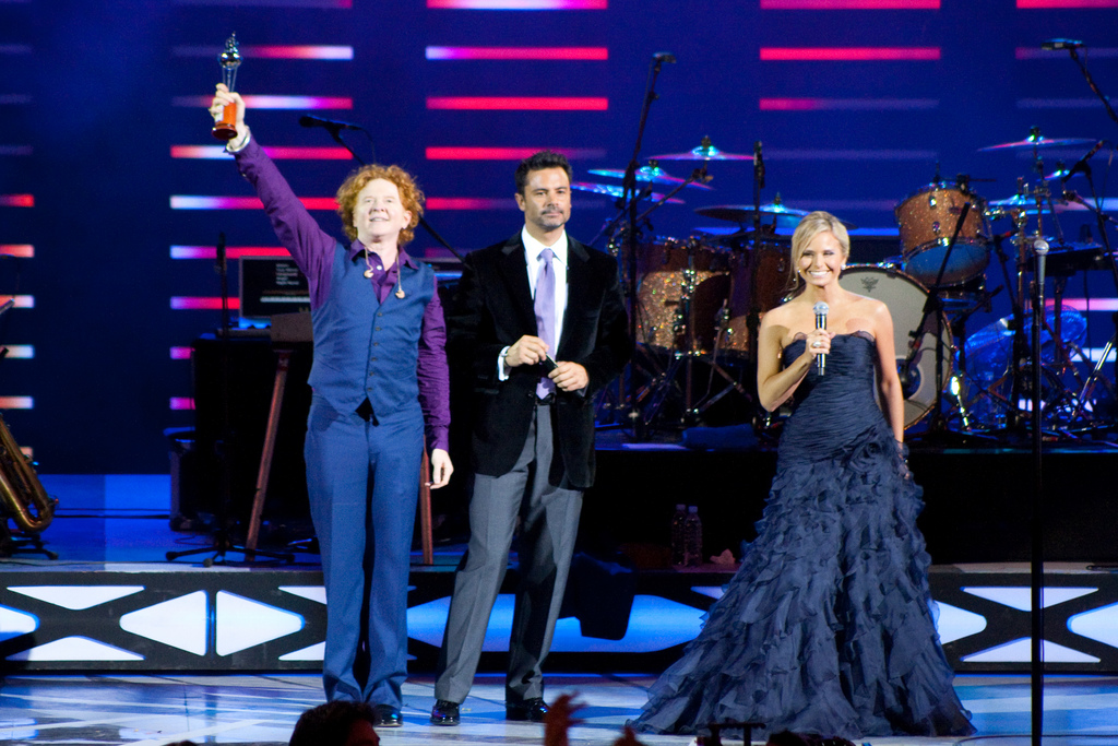 Simply Red en Viña del Mar, Chile